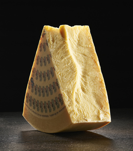 Sbrinz Switzerland AOC